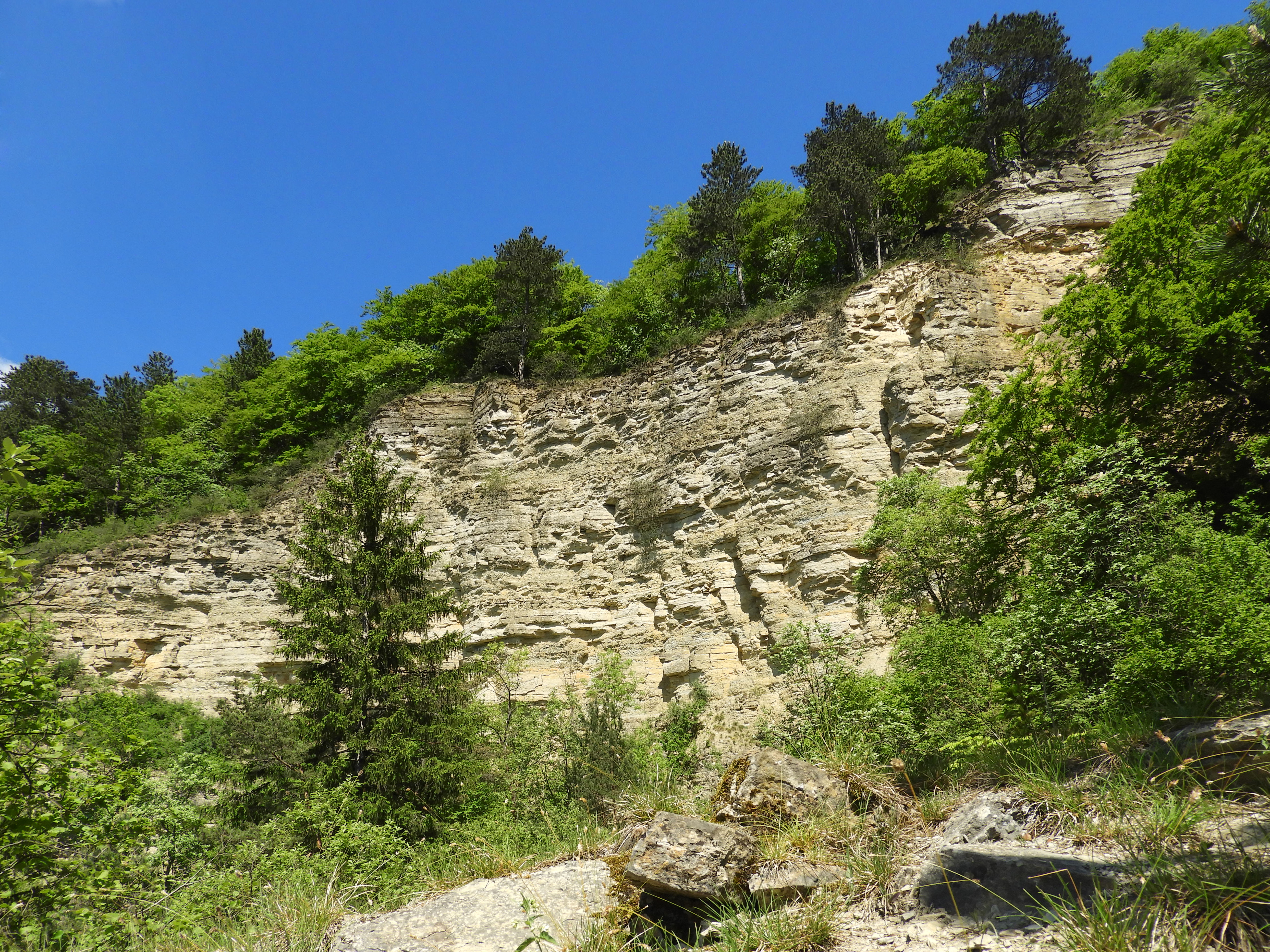 Teil mehrerer Schutzgebiete: Die freistehende und aus der bewaldeten Umgebung weithin sichtbare Kalksteinwand der Plesse.